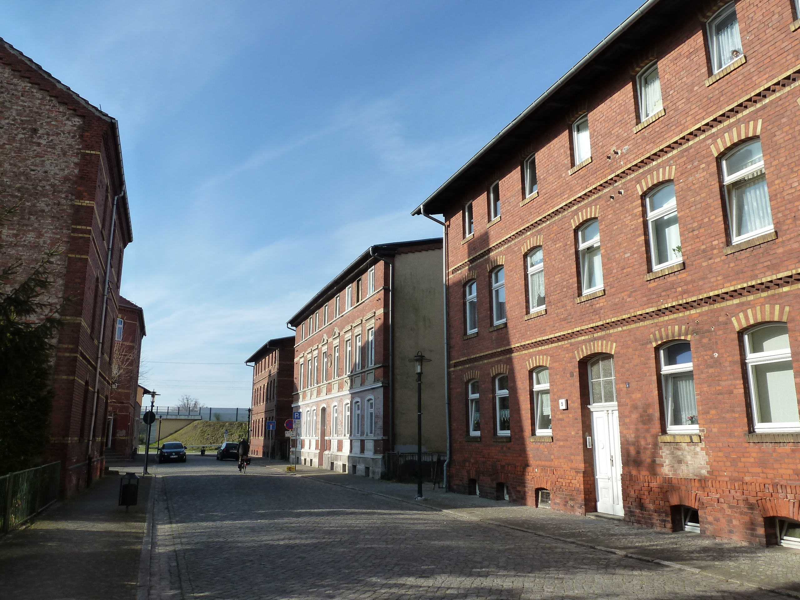 Als Denkmalbereich ausgewiesene Eisenbahnersiedlung in Falkenberg/Elster.